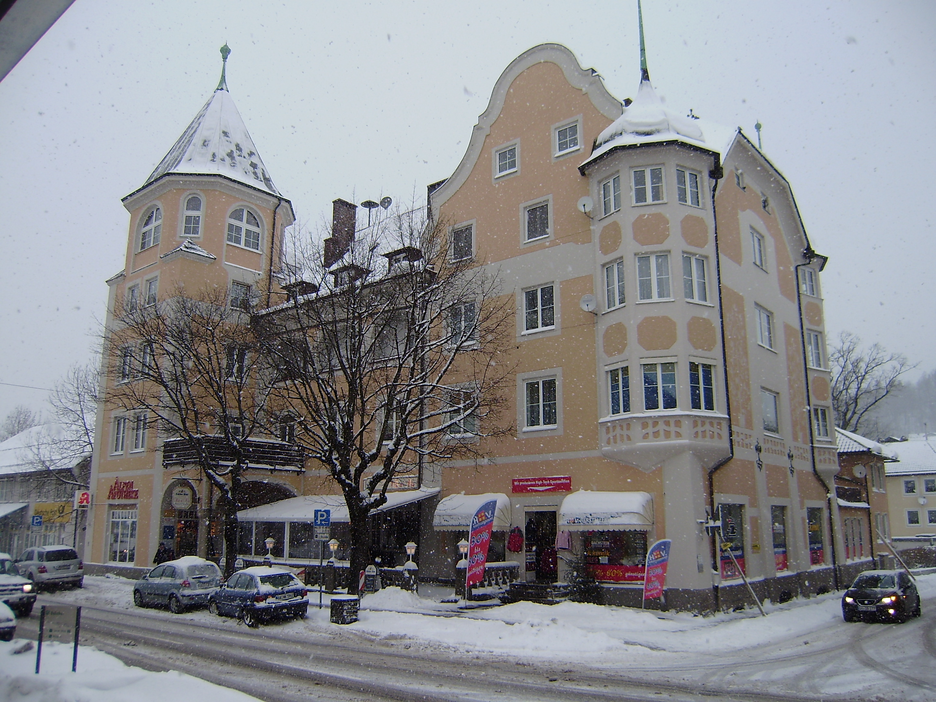 Bayerischer Hof, ehemaliges Hotel und Restaurant gegenüber dem Bahnhof Immenstadt im Allgäu. 1903 geplant und erbaut von Christian Bufler.